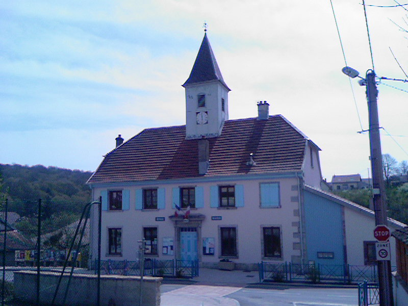 mairie et ecole d'Allondans